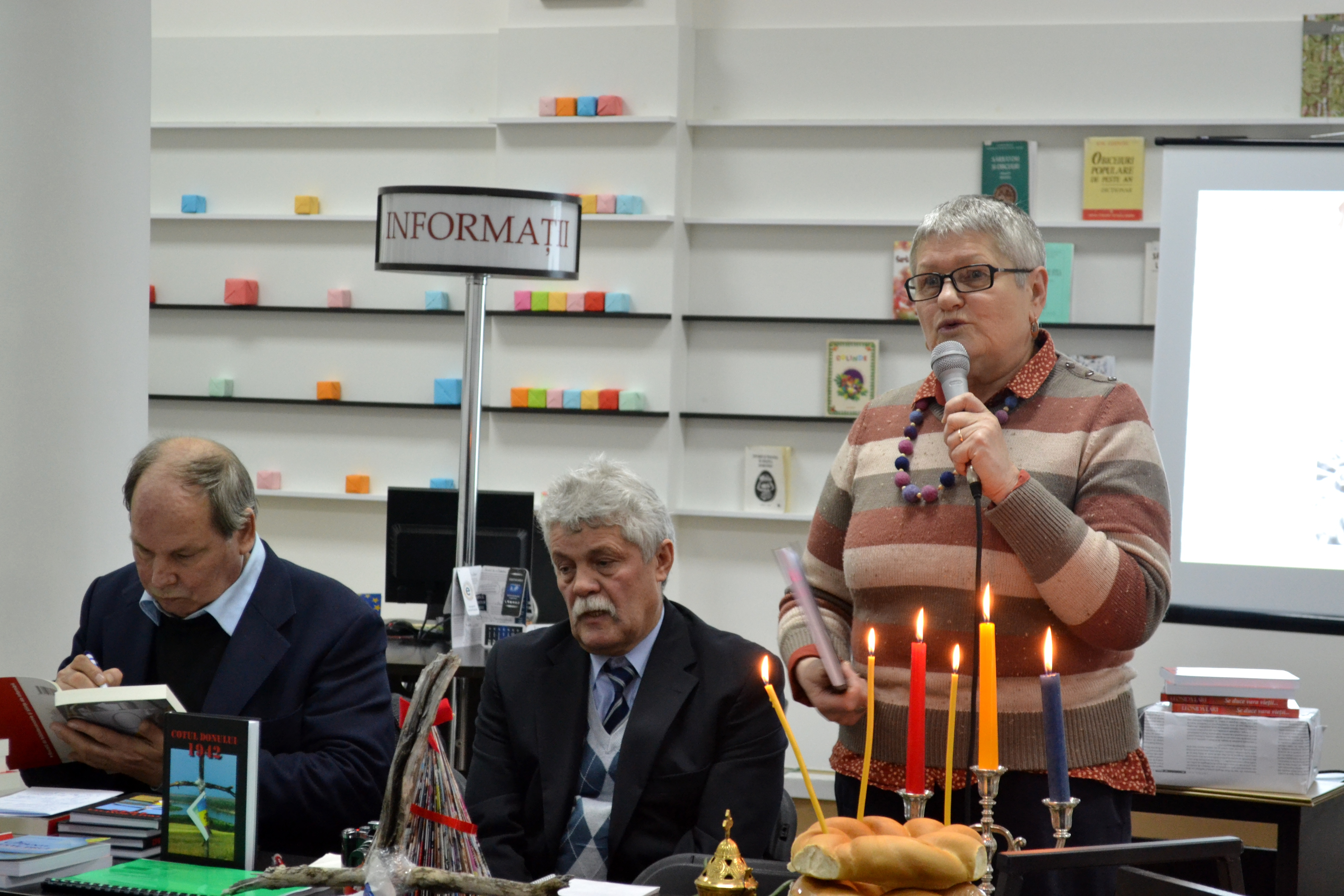 Lansare de carte „Cotul Donului 1942”, de Vasile Șoimaru. Biblioteca Centrală, 11.12.2013.